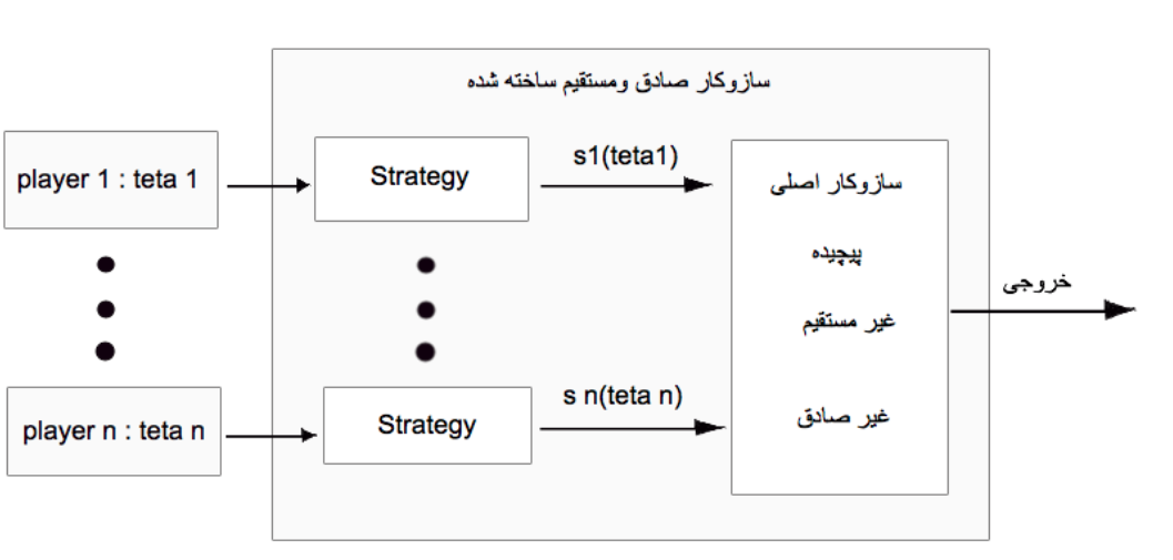 روابط در طراحی سازوکار به صورت شماتیک